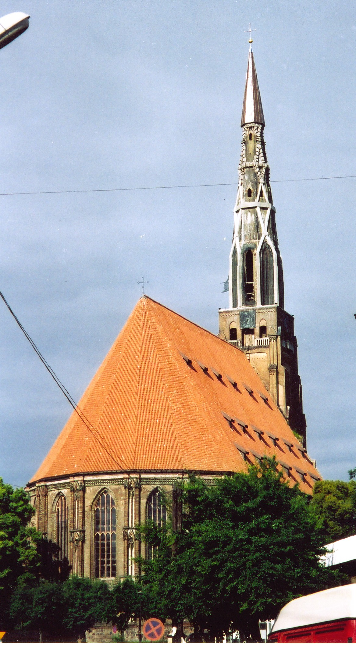 Zabezpieczenie wieży kościoła Mariackiego w Chojnie za pomocą konstrukcji sieciowej zaprojektowanej przez architekta Macieja Płotkowiaka